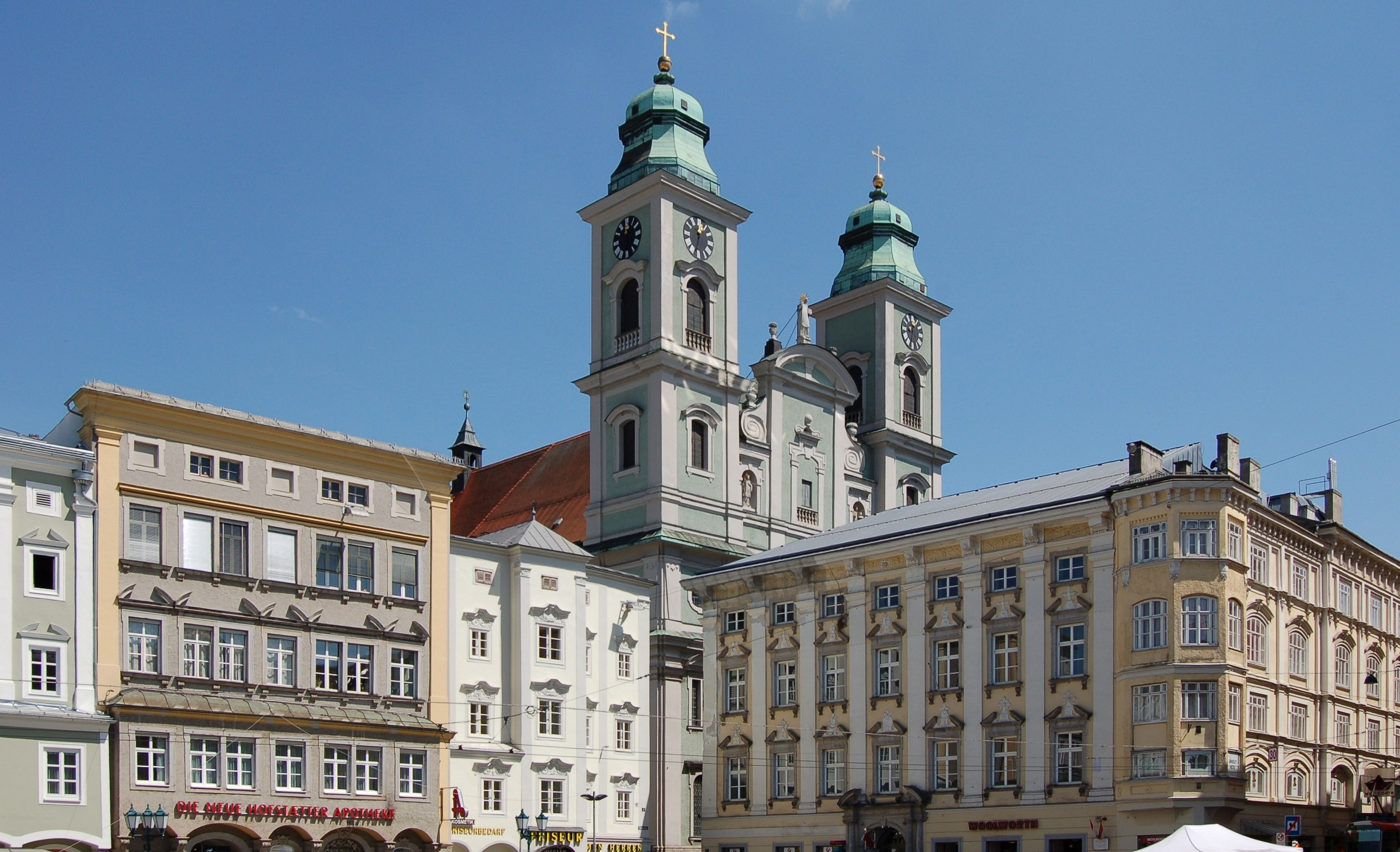 Alter Dom in Linz gesehen vom Hauptplatz